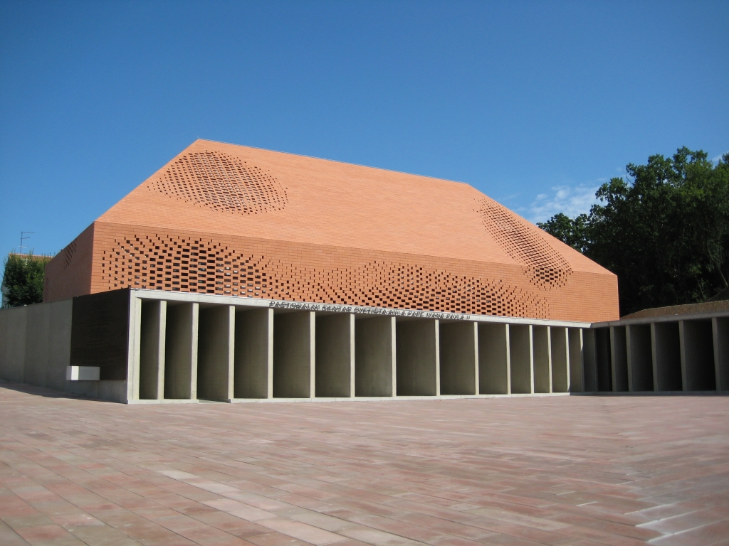 Pastoralni centar na Trsatu.